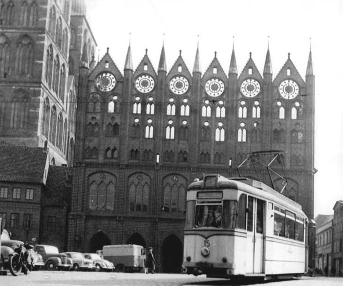 Stralsund, Rathaus, Straßenbahn Zentralbild Lehmann 7.4.1966 Strassenbahn für immer pensioniert Die Stralsunder Straßenbahn, die der Bevölkerung der Hafenstadt 66 Jahre lang treue Dienste geleistet hat (hier vor dem historischen Rathaus), wird am 7.April 1966 für immer pensioniert. Infolge ihrer Alterserscheinungen war sie zu langsam und ein Verkehrshindernis geworden. Durch modere Stadtbusse wird die Straßenbahn ersetzt. Durch diese Umstellung werden die Einwohner der Hafenstadt wesentlich schneller befördert werden. Information added by Wikimedia users.Das Bild zeigt die letzte Fahrt der Straßenbahn in Stralsund über den Alter Markt (Stralsund), im Hintergrund das Stralsunder Rathaus.